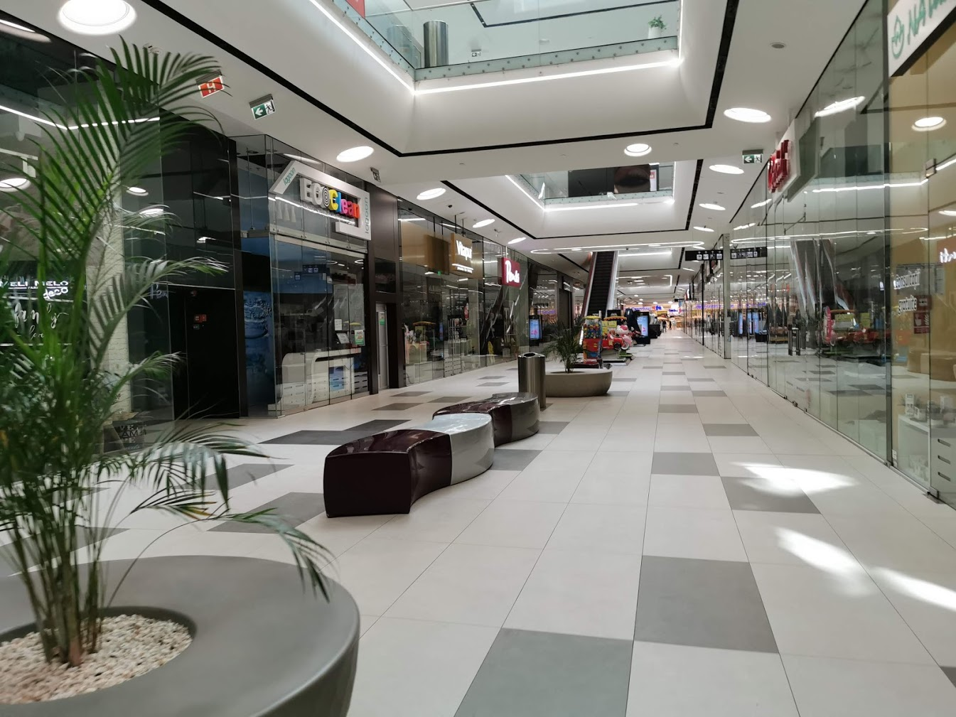 Mall închis în timpul Covid 19, București, martie 2020